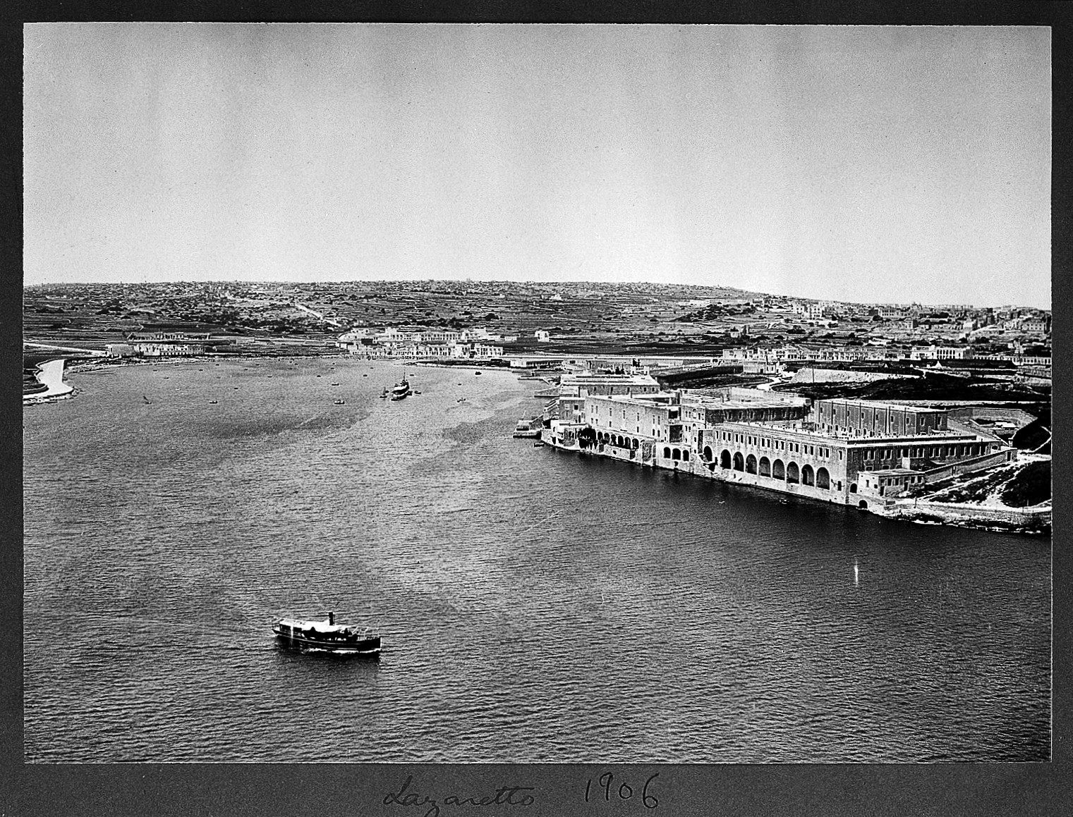 Lazaretto Hospital, Malta 1906. Archives & Manuscripts